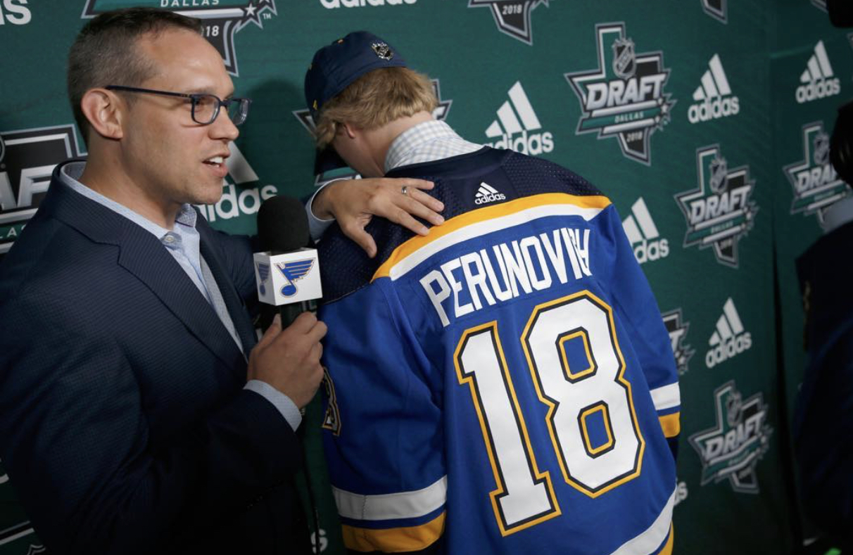 Scott Perunovich St. Louis Blues 2nd round selection. 2018 NHL draft. With reporter Andy Strickland St. Louis Blues